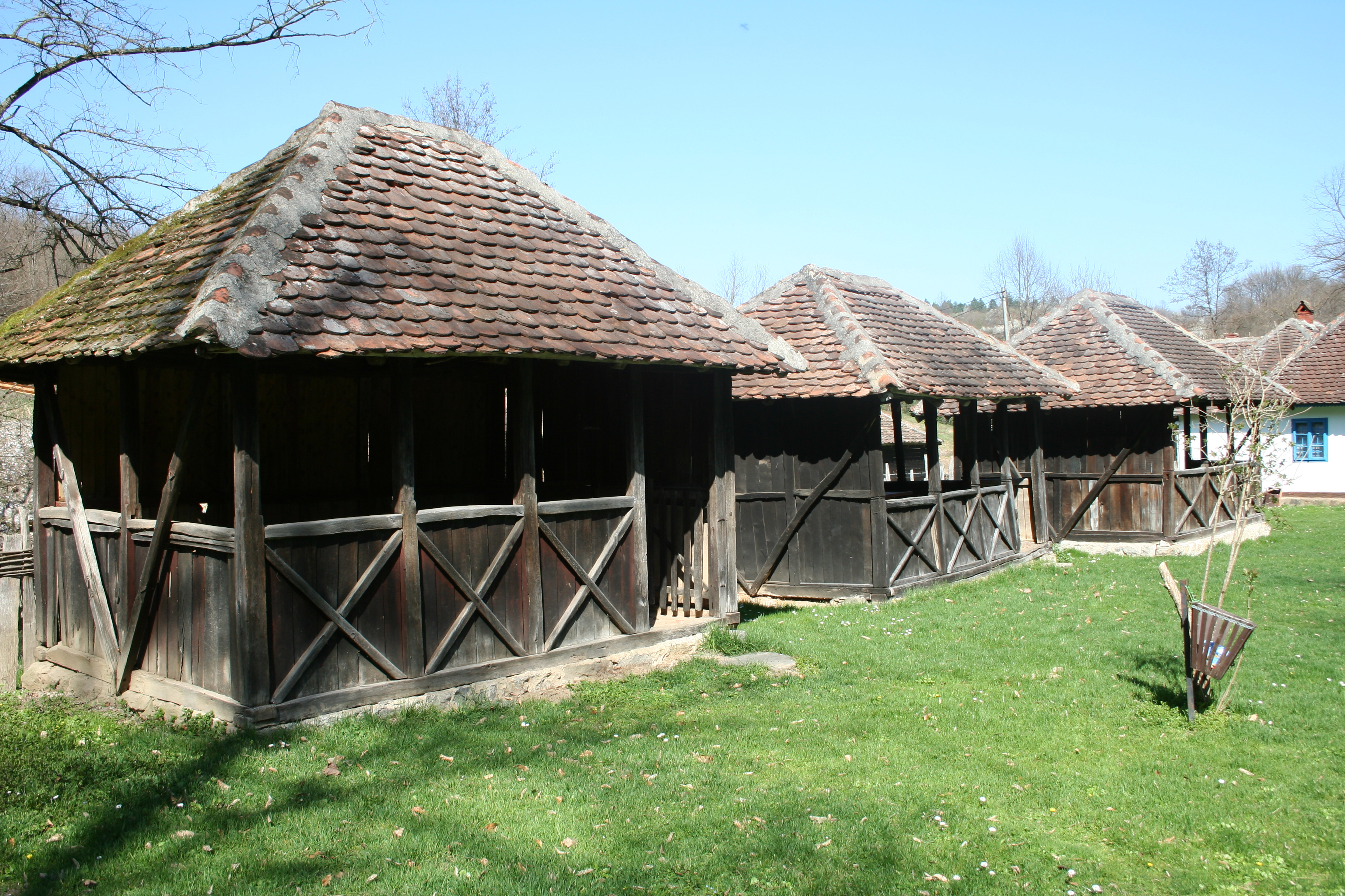 Sobrašice u porti crkve, Brankovina